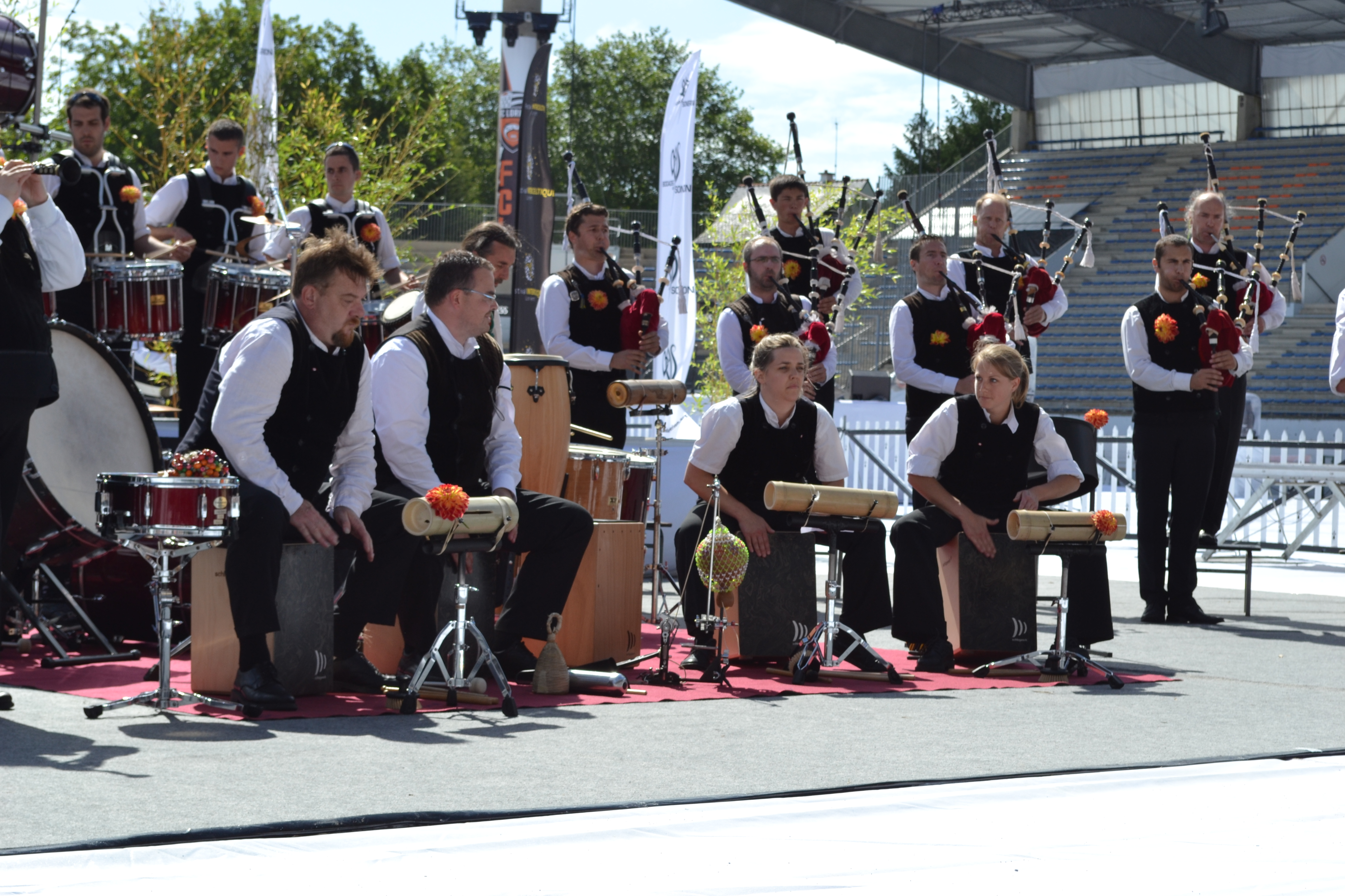 Le bagad Cap Caval sur la scène du stade du Moustoir pour le championnat 1re catégorie, lors du Festival interceltique de Lorient 2012 (Morbihan, Bretagne).